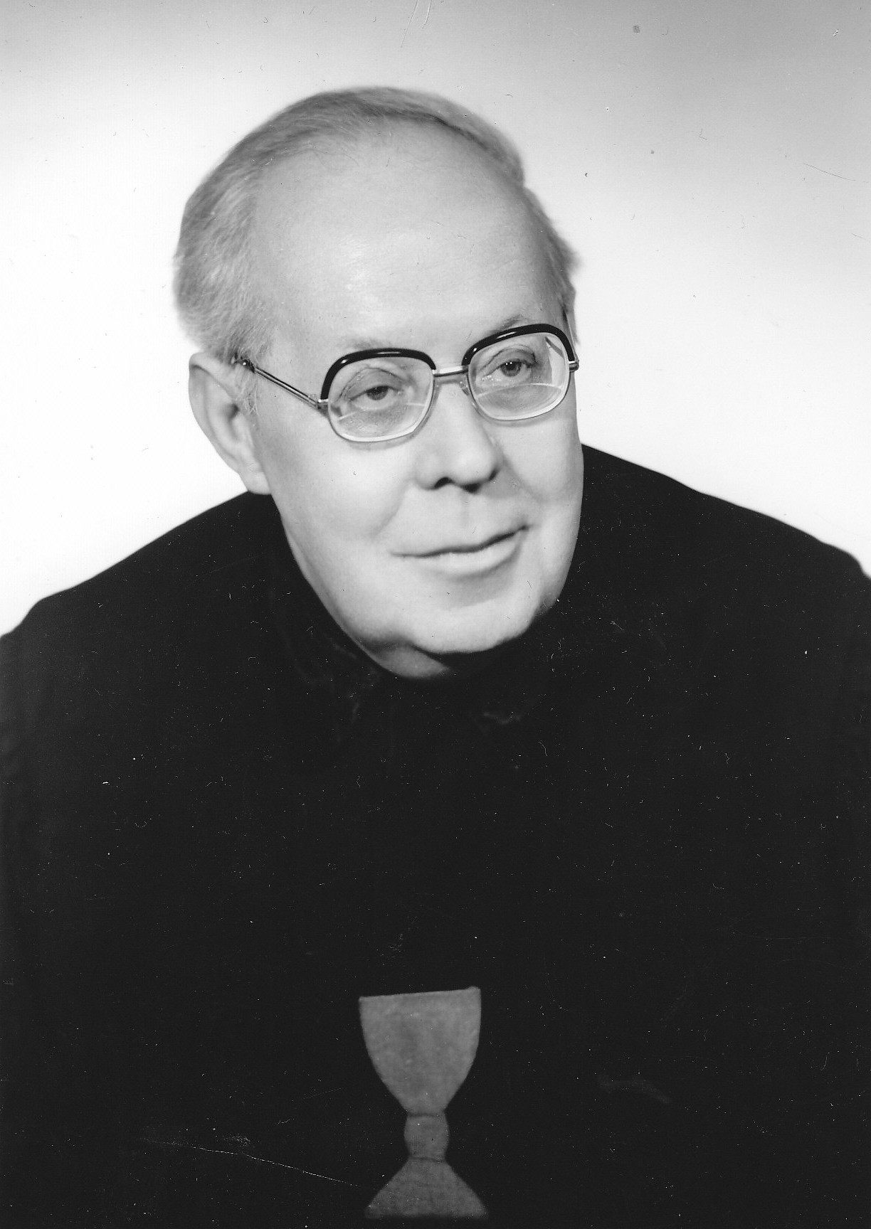 biskup Durchanek